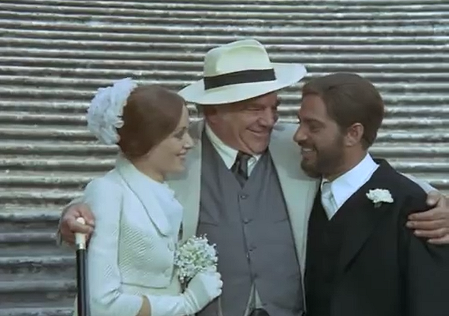 Per grazia ricevuta